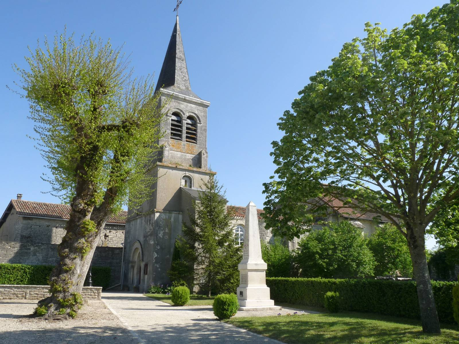 Eglise et monument aux morts de Vervant, Charente, France